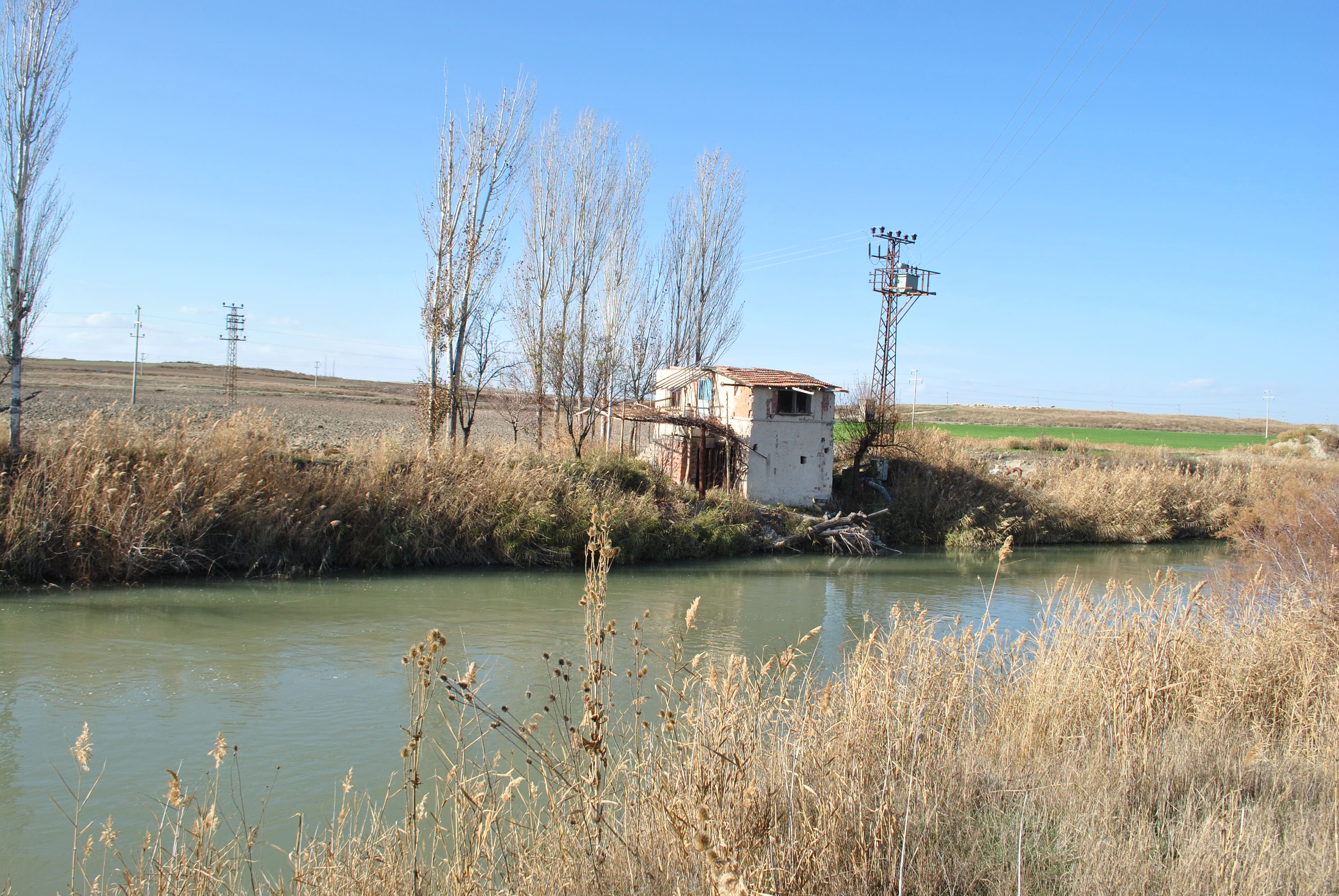 Yassıhöyük, Polatlı, Ankara, Türkiye